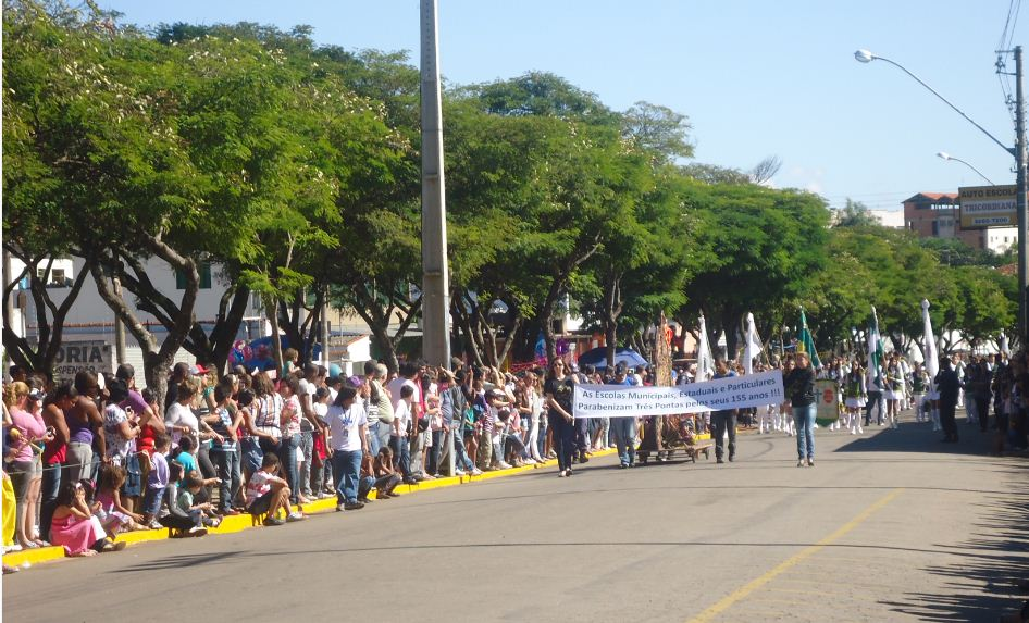 Desfile das comemorações do aniversário da cidade, em 3 de julho de 2012